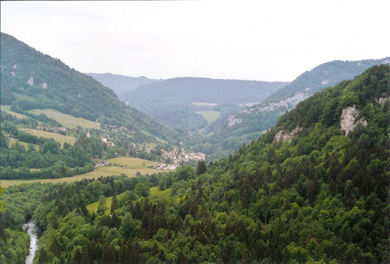 Das Bild zeigt das Tal des Doubs bei Goumois